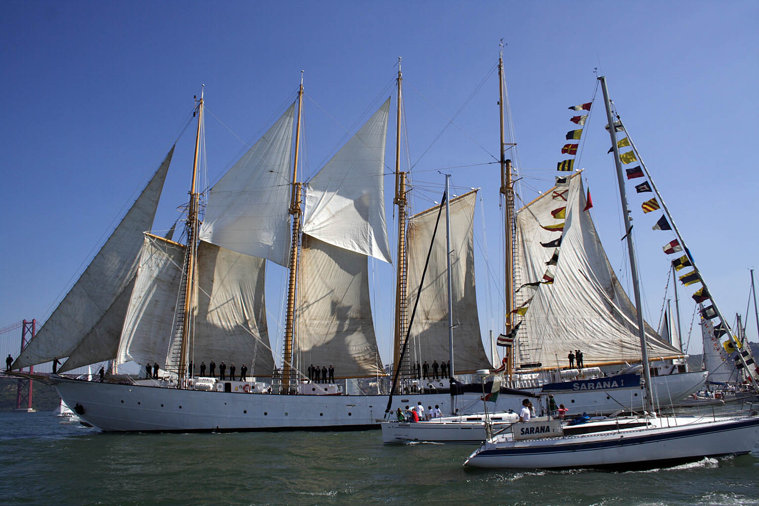 Creoula - na comemoração dos 150 anos da Associação Naval de Lisboa navegando no Tejo. Fotografia tirada no rio Tejo, pelas comemorações dos 150 anos da Associação Naval de Lisboa